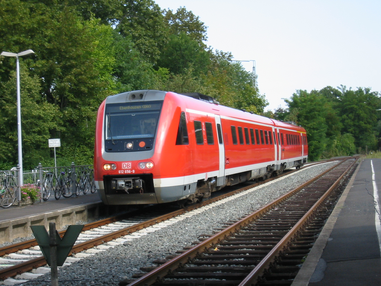 Dieseltriebwagen VT 612 (mit Neigetechnik) der Deutschen Bahn AG in Bad Kissingen.